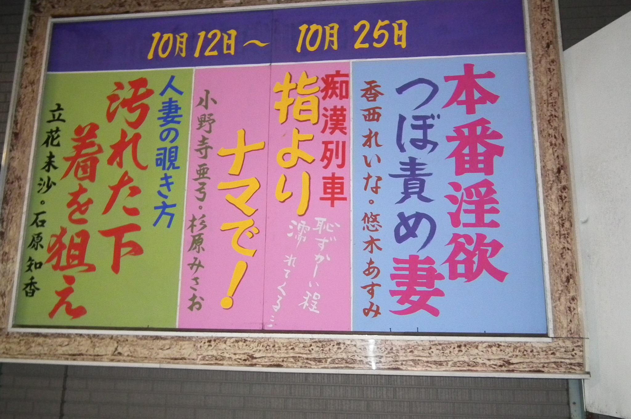 兵庫県明石市の明石本町日活。晩年は成人映画館（ポルノ映画館）。2014年閉館。